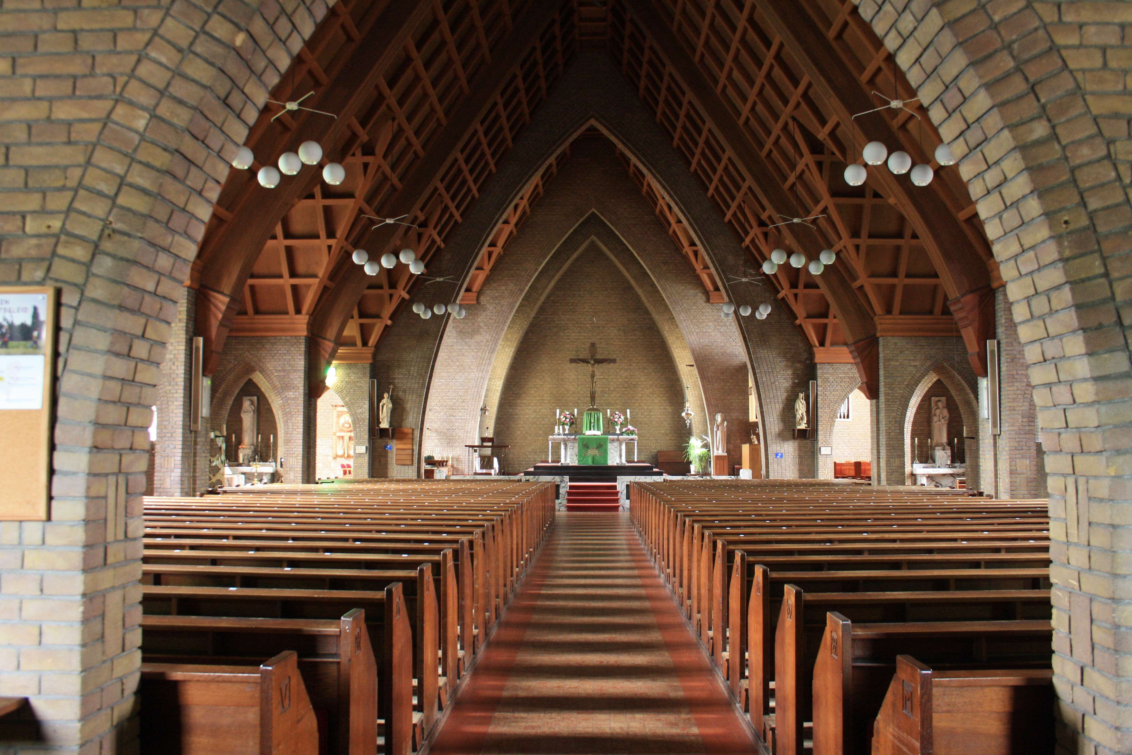 Overzichtsfoto interieur van de Sint Martinuskerk te Zwaag, gezien vanuit de entree via het middenpad naar het hoogaltaar